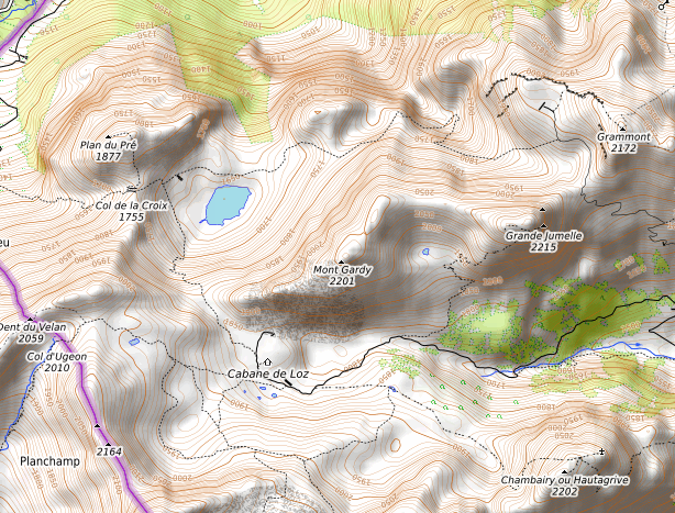 carte réalisée sur umap This map may be incomplete, and may contain errors. Don't rely solely on it for navigation.